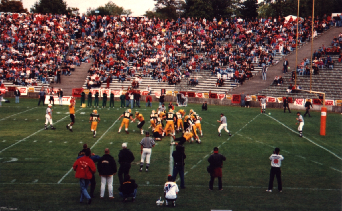 Ein Touchdown der Munich Cowboys beim German Bowl Sieg 1993 gegen die Cologne Crocodiles im Olympia-Reitstadion München